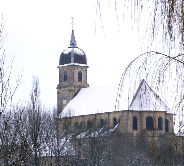 Eglise de Scey sur Saône en hiver